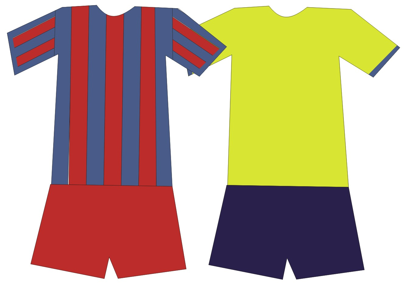 Equipación FC Barcelona temporada 2005-2006